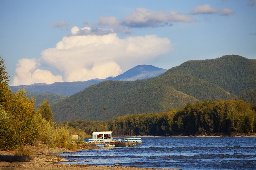 Паромная переправа